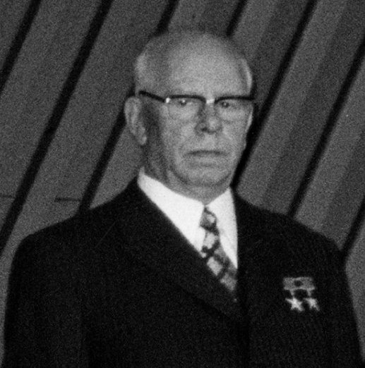 Ystävyys-, yhteistyö- ja avunantosopimuksen allekirjoitus Finlandia-talossa. Kuvassa Neuvostoliiton ja Suomen presidentit Nikolai Viktorovitš Podgornyi ja Urho Kaleva Kekkonen.